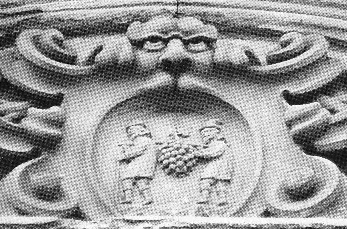 Skeppsbron 24, Stockholm, fasaddetalj